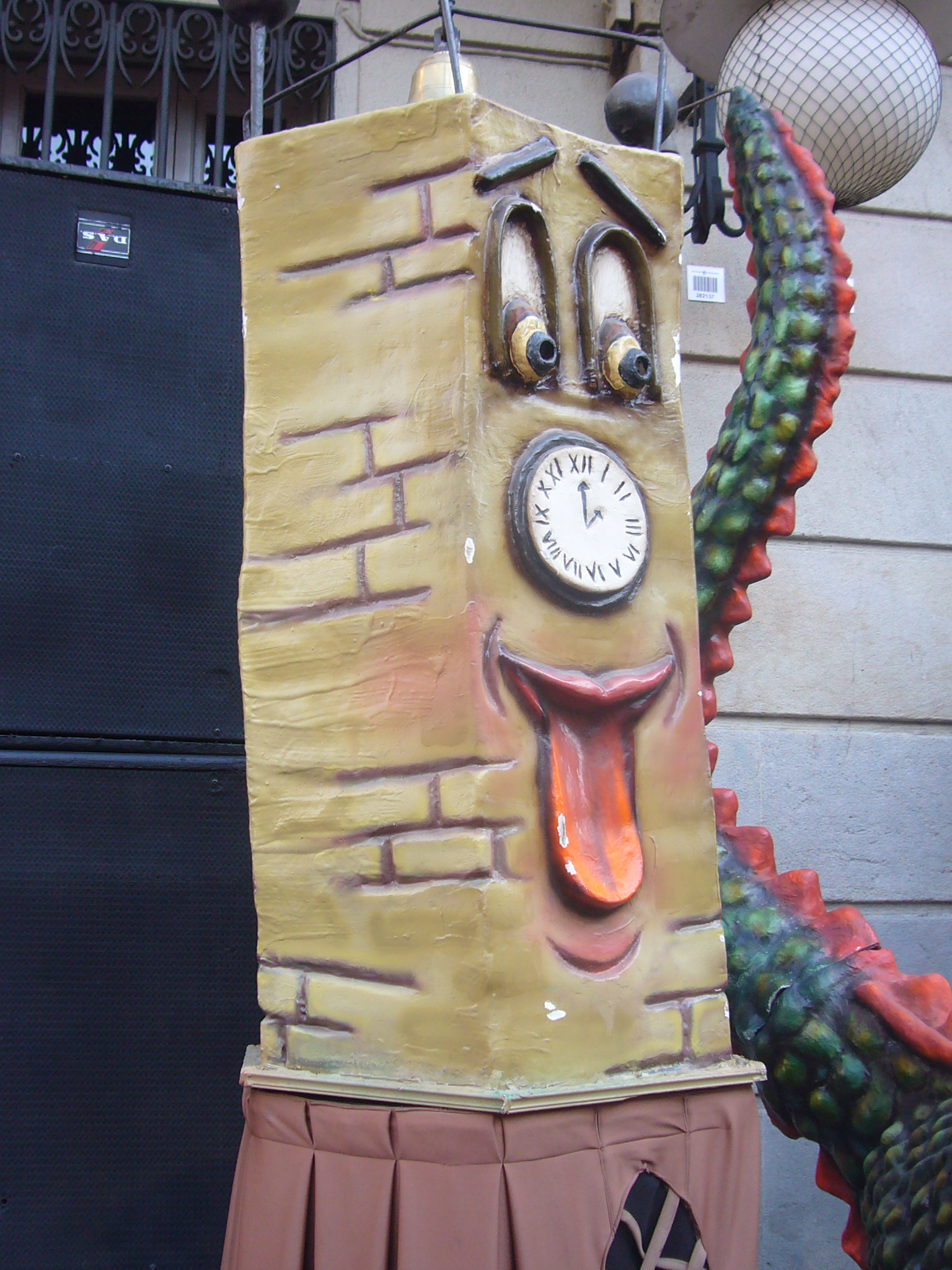 Gegantó Pepitu Campanar de Gràcia, de la Vila de Gràcia